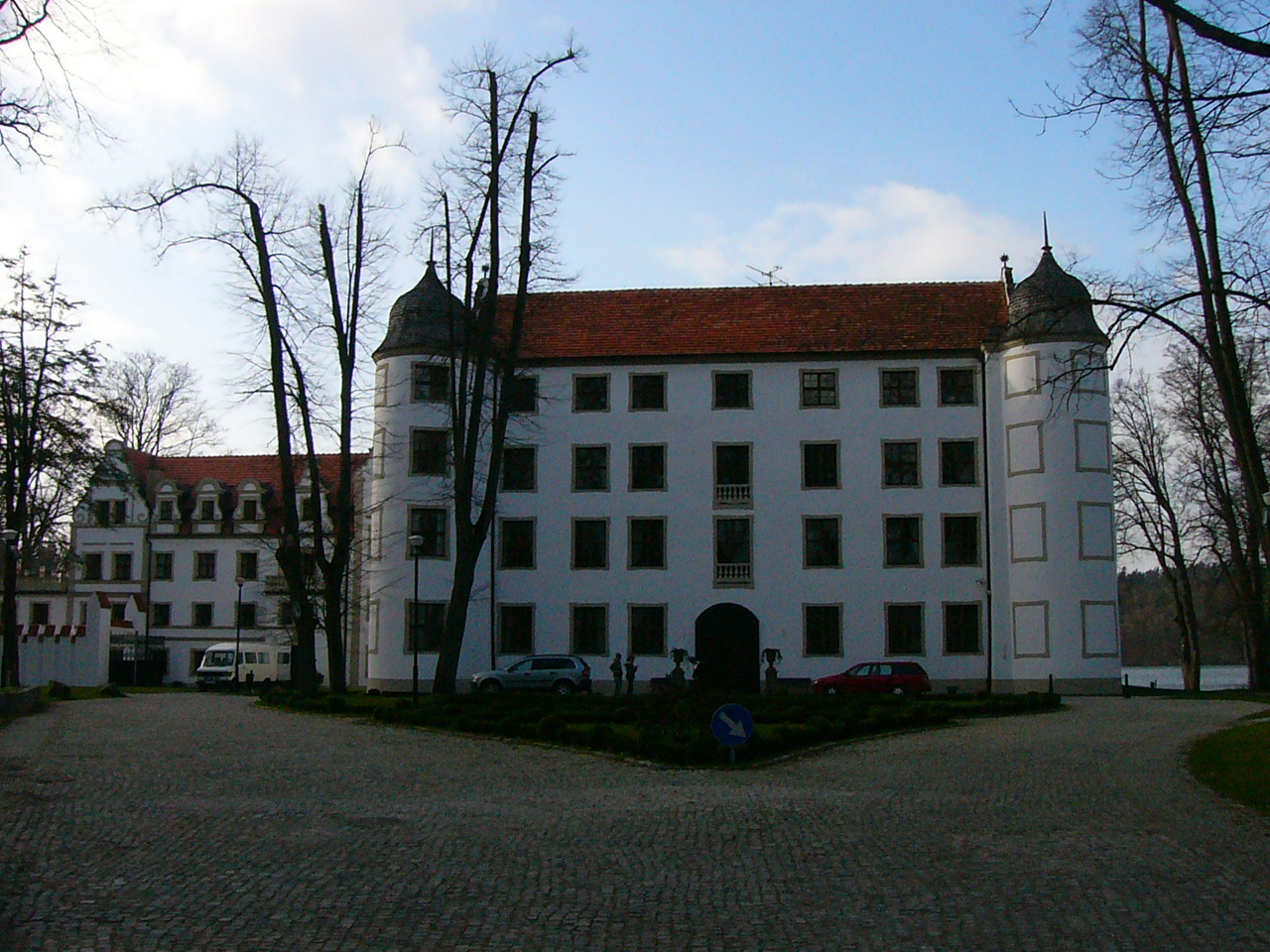 XV-wieczny zamek w Krągu (zabytek nr rejestr. 105)